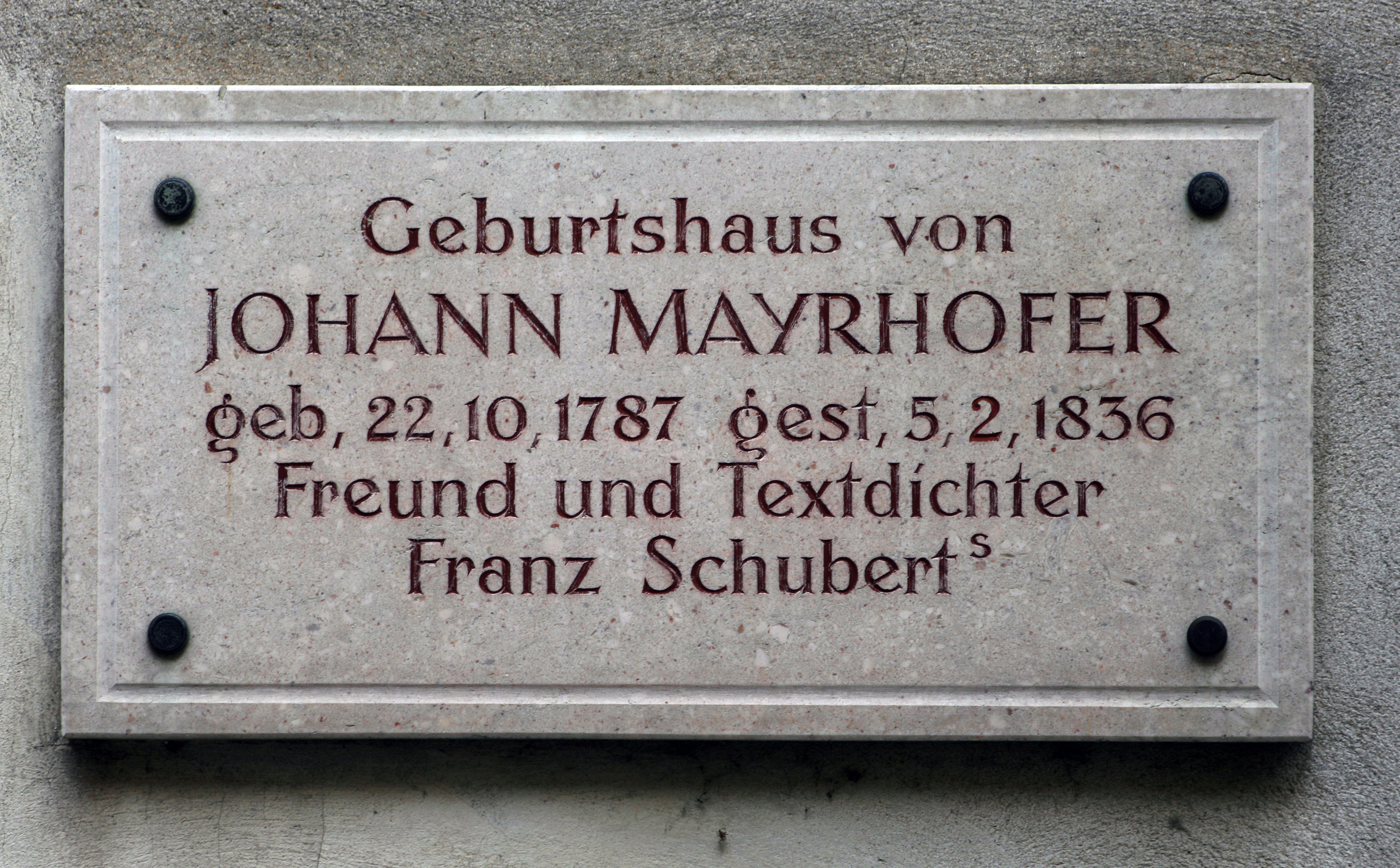 Gedenktafel an Johann Mayrhofers Geburtshaus in der Steyrer Pfarrgasse 12